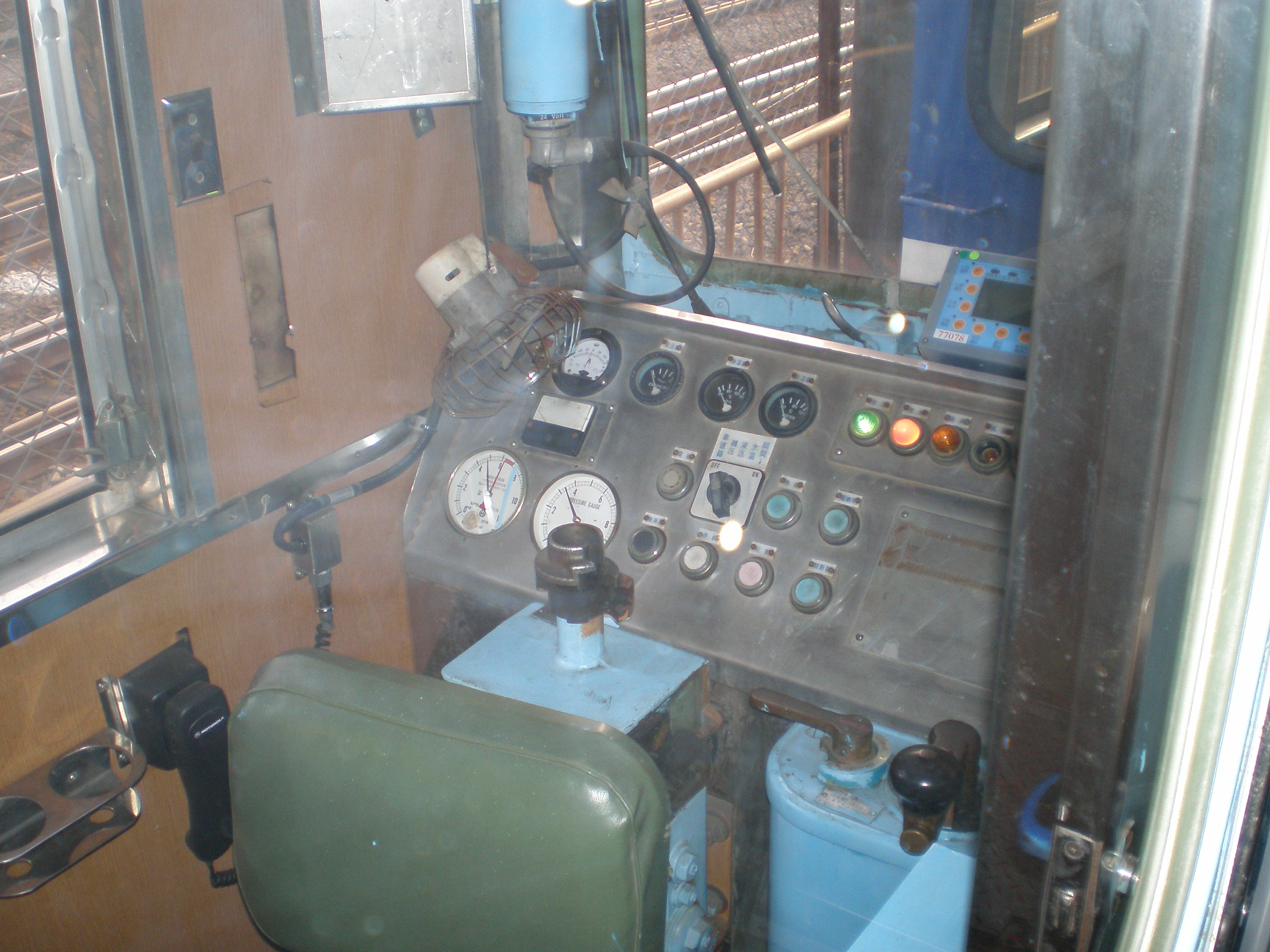 中文（台灣）: 台鐵DR2510型柴油車駕駛室。